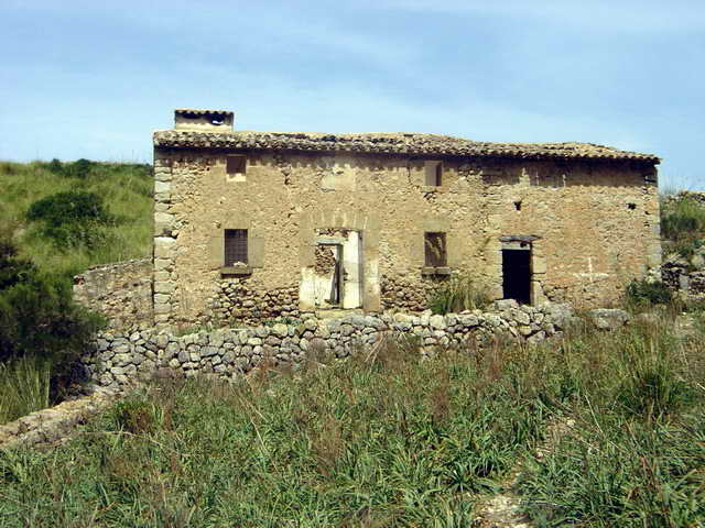 Rafal d'Ariant. Escorca. Mallorca.